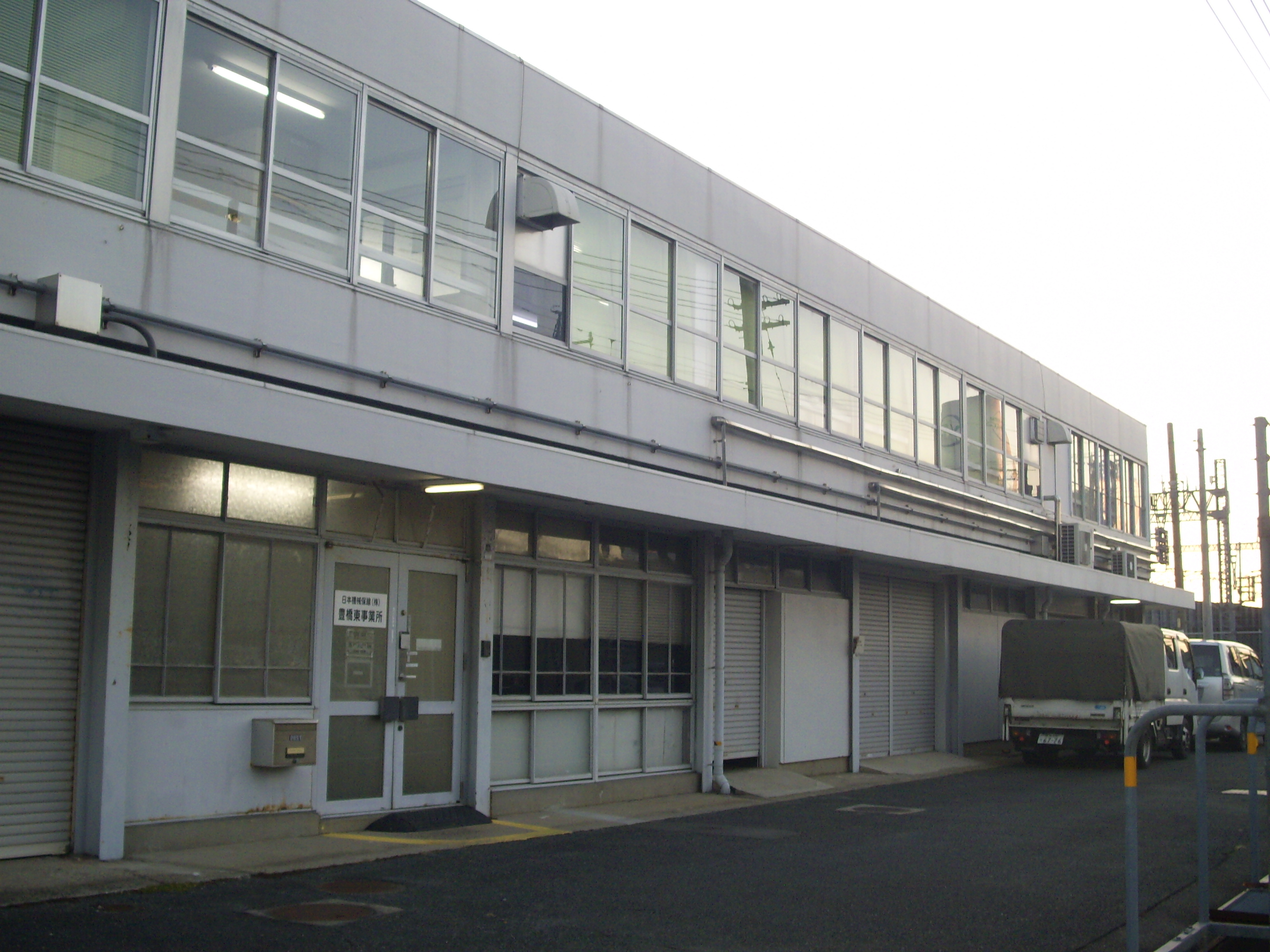 JR東海系列の日本機械保線豊橋東事業所 ㊟カメラを起動すると日付機能が出荷時のものに初期化されるため、ファイル履歴の投稿日時とメタデータの原画像データの生成日時が異なります（本概要欄の下記日付が撮影日）